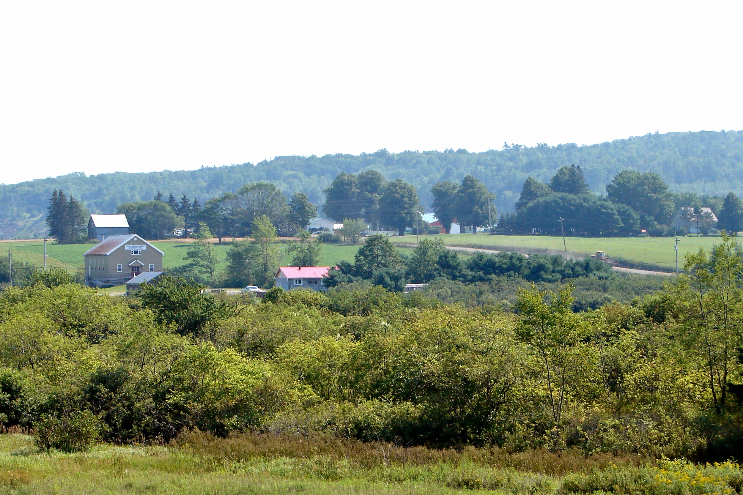 Upper Musquodoboit, Nova Scotia, Canada